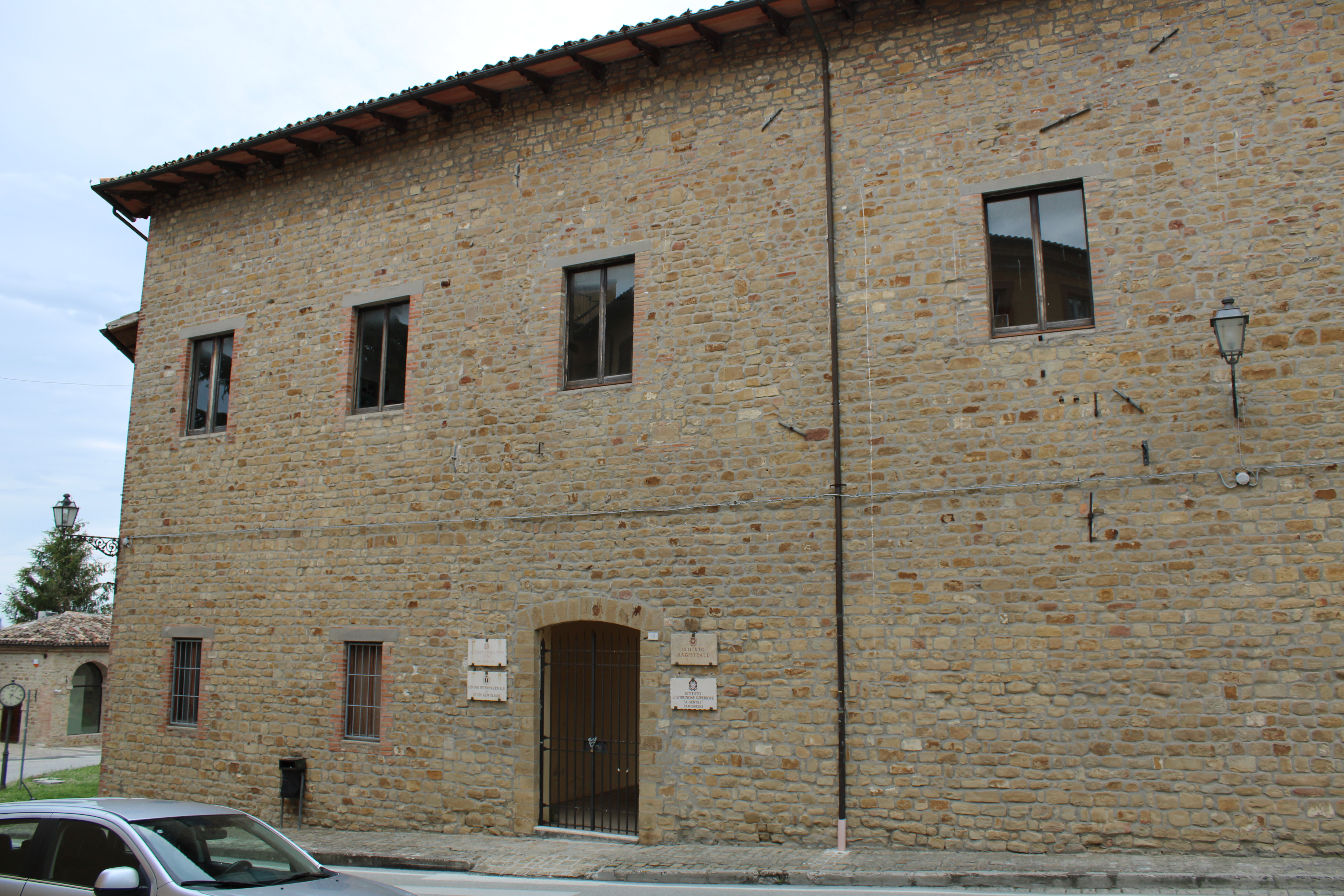 Sede principale dell'Istituto di Istruzione Superiore "Alberico Gentili" e del Centro Internazionale degli Studi Gentiliani. La struttura è un ex convento degli agostiniani.